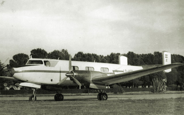 Avión de la Fábrica Militar de Aviones de Córdoba